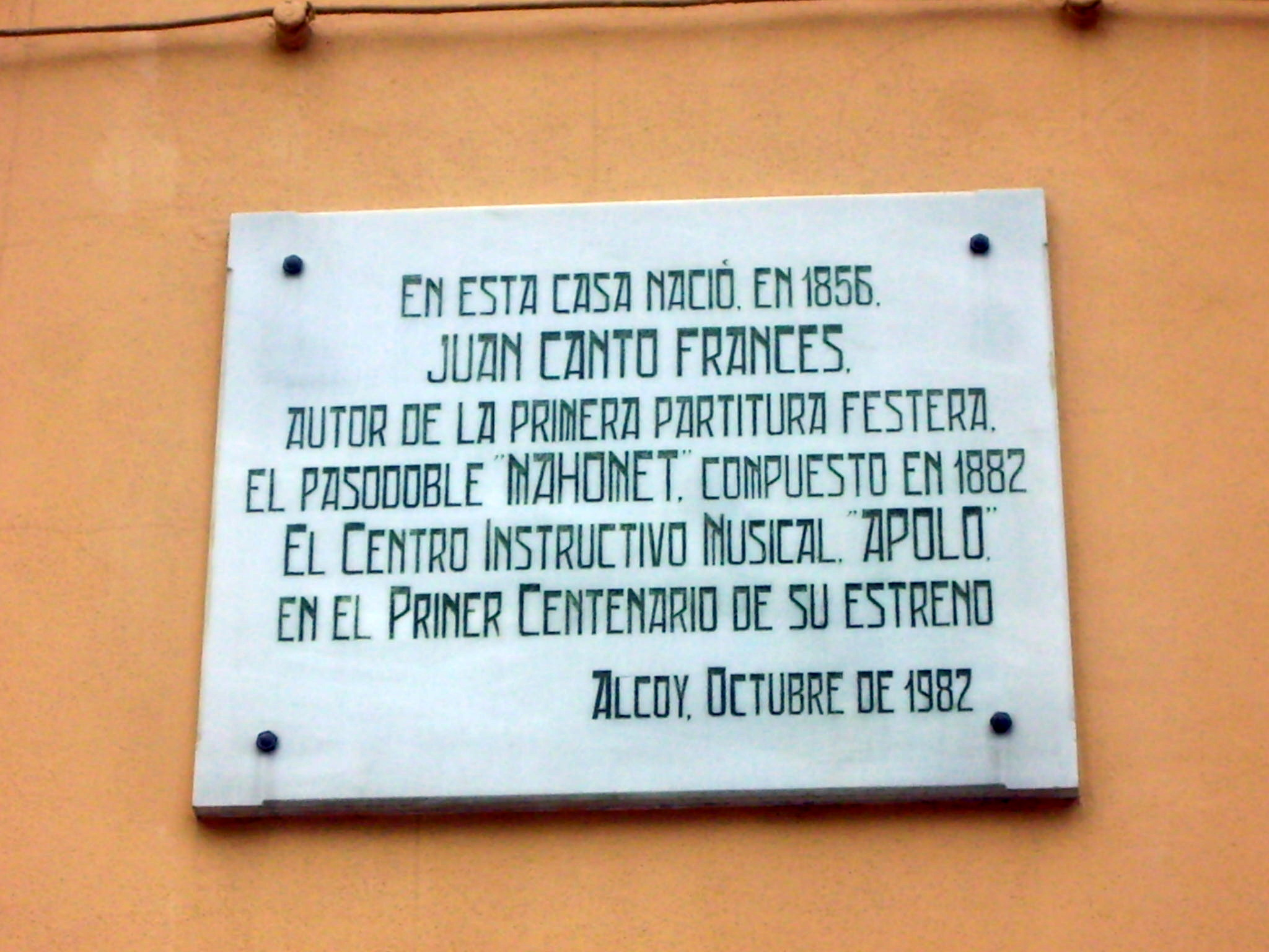 Placa commemorativa naixement Joan Cantó